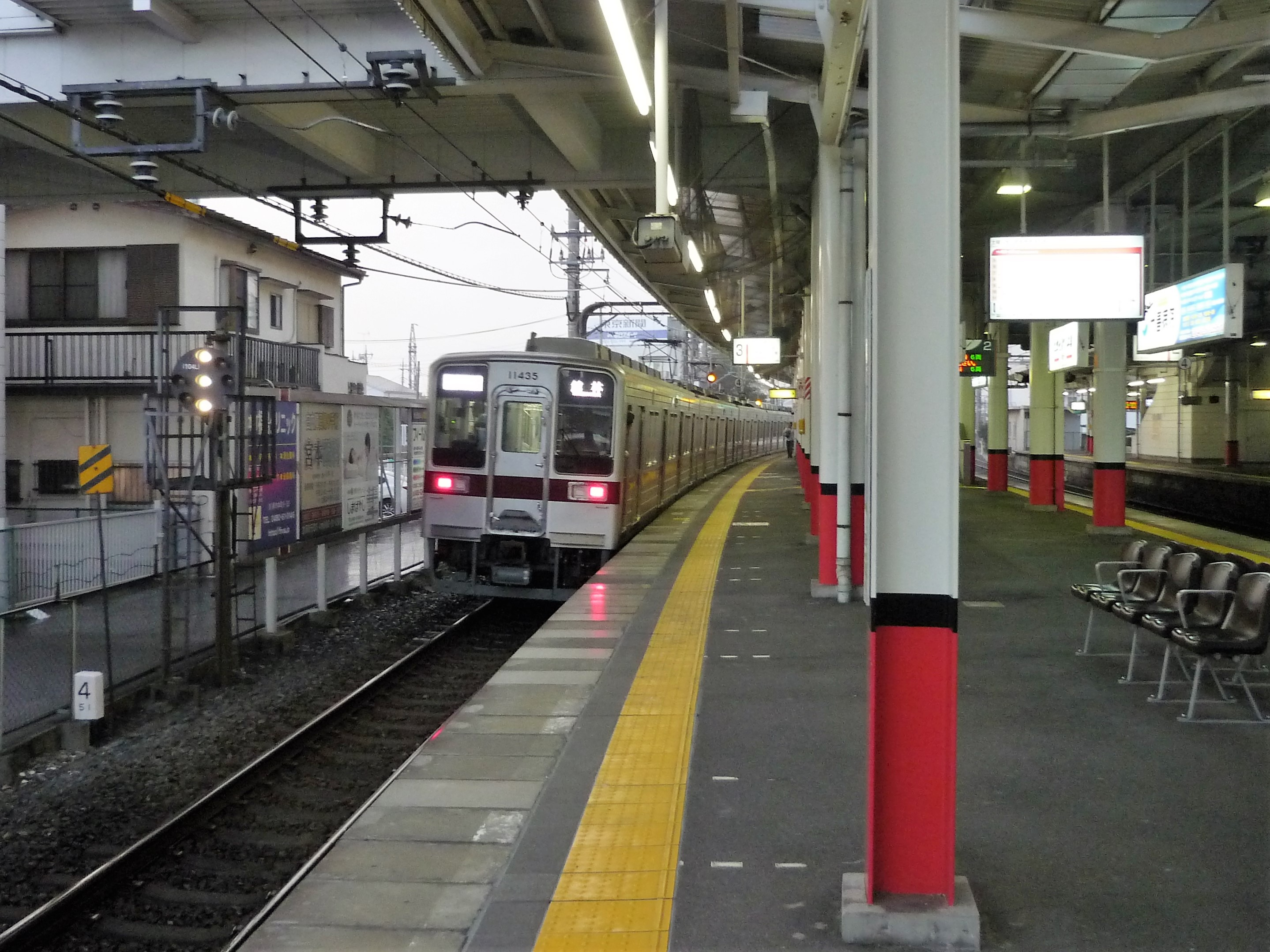 東武鉄道伊勢崎線 加須駅ホーム Panasonic Lumix DMC-FS3